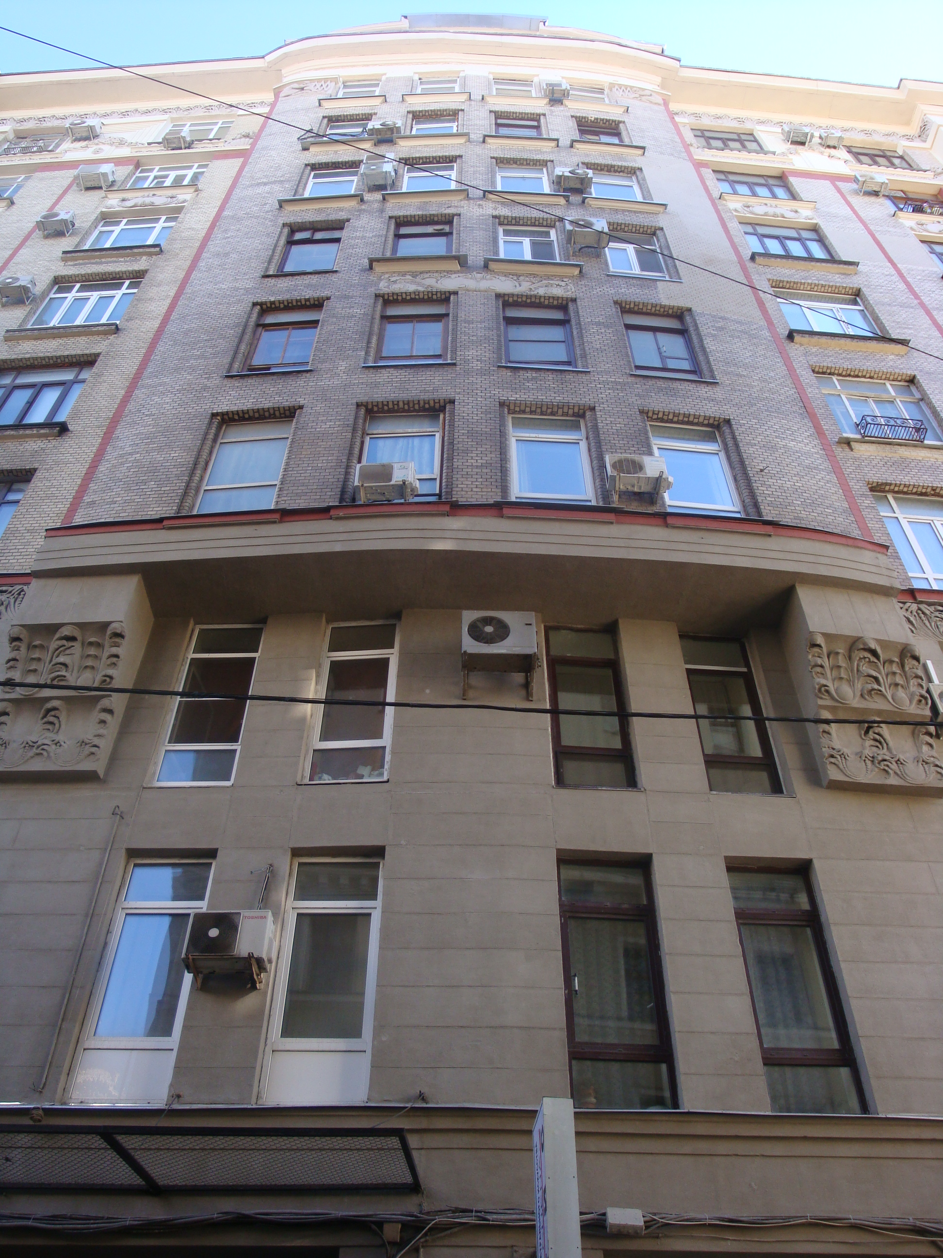 Первый столичный небоскреб: Гнездниковский Б. пер., дом 10, Тверской, Центральный округ, Москва